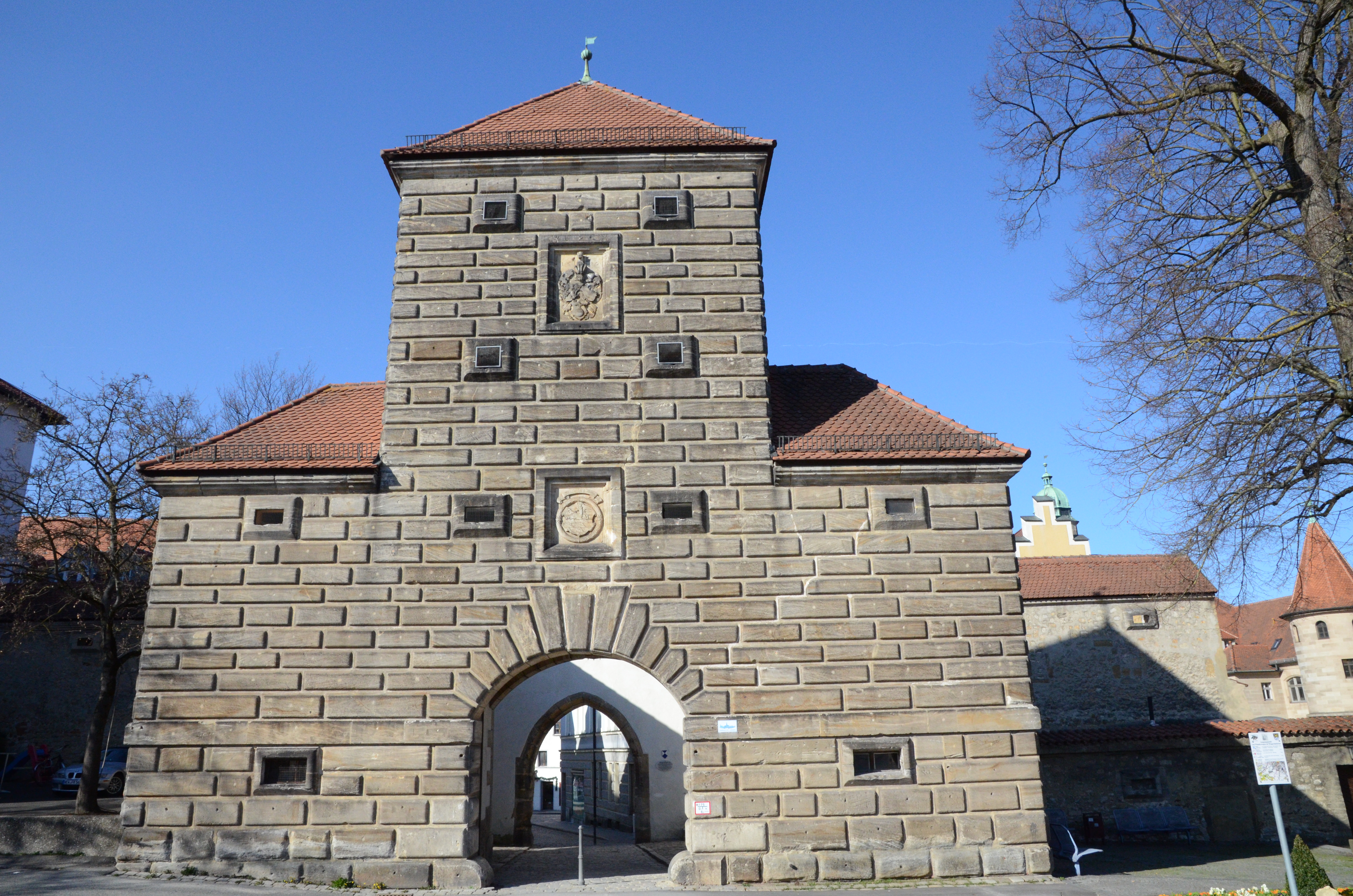 Amberg Wingershofertor